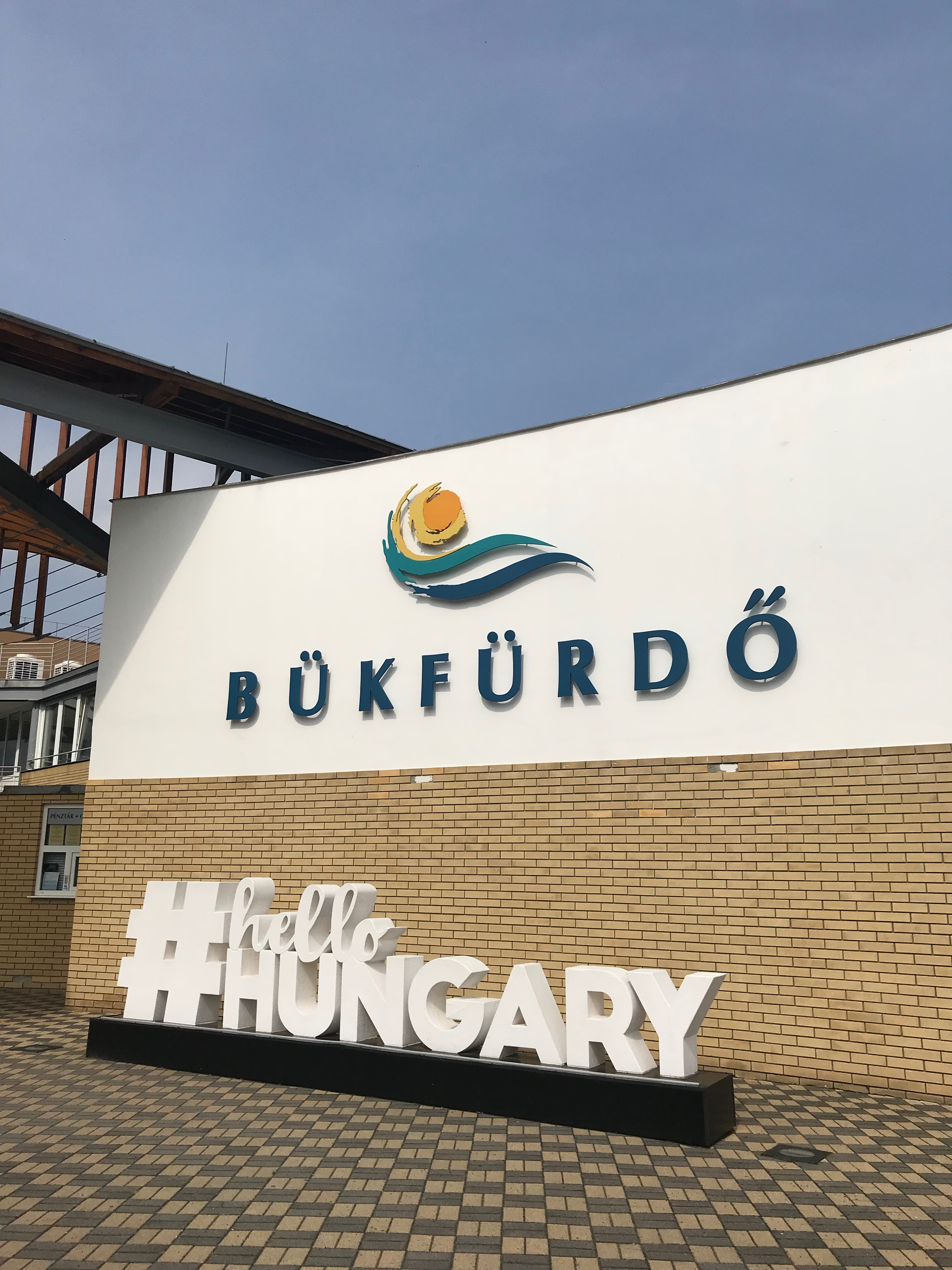 Eingang Bükfürdő Thermal & Spa